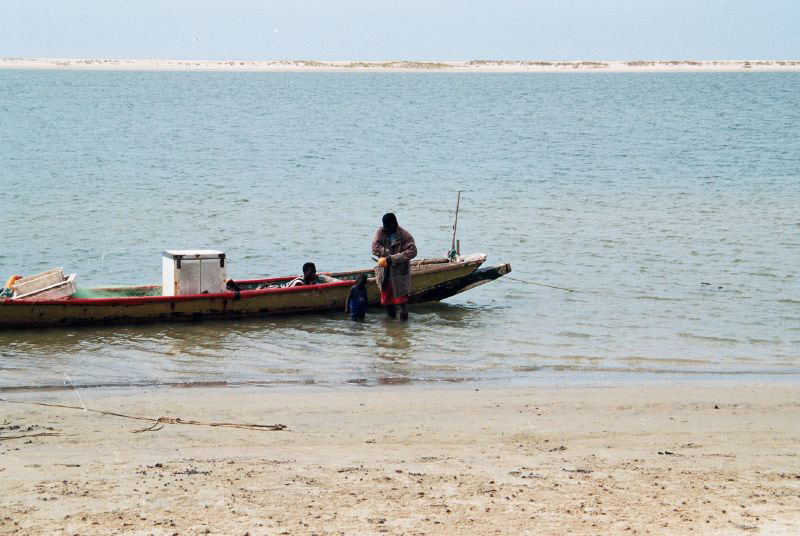 Pêcheurs dans le village de Taré au Sénégal